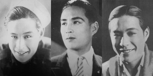 中文（中国大陆）: 中国30年代的影帝--金焰